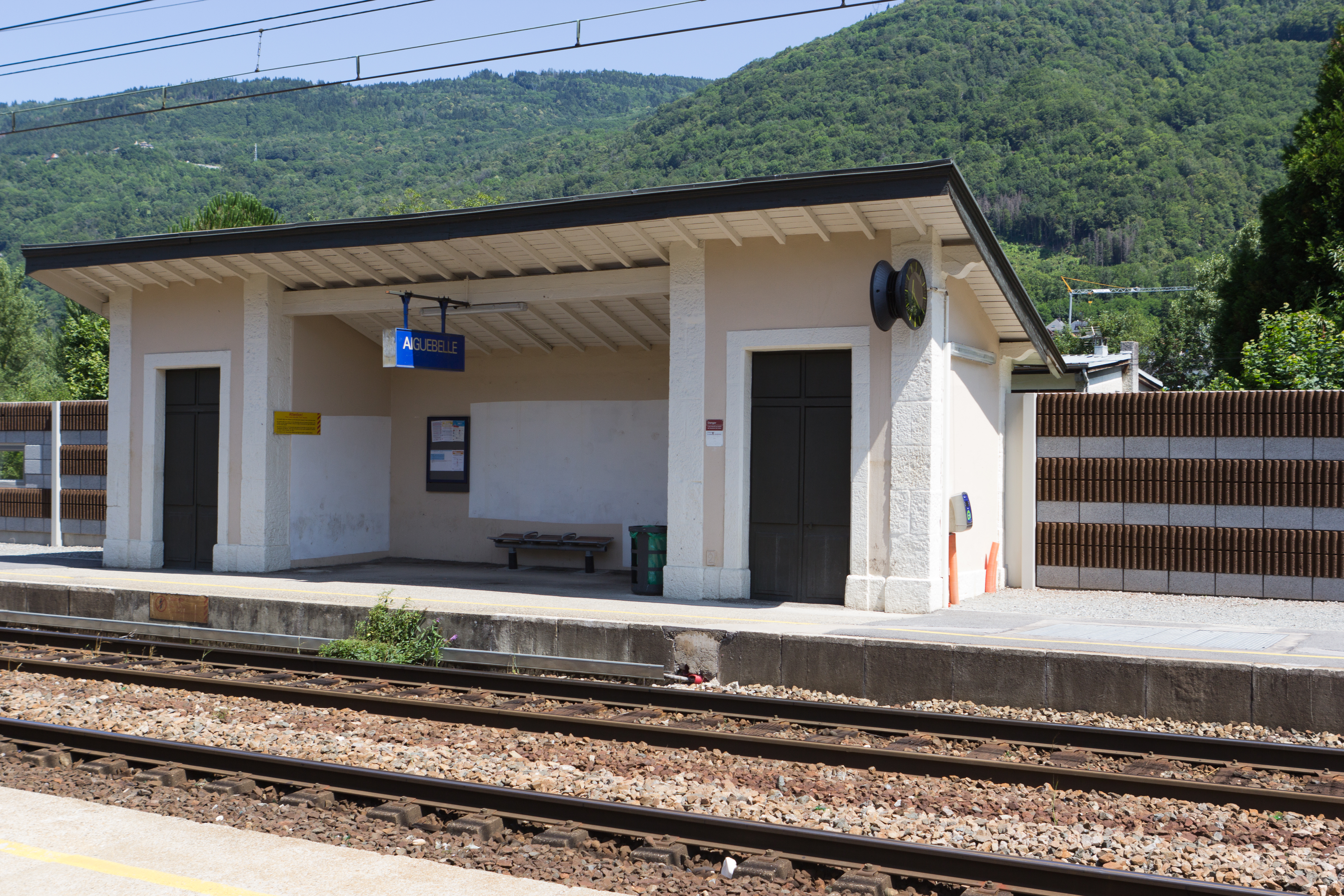 Gare d'Aiguebelle, commune d'Aiguebelle, département de la Savoie, France.